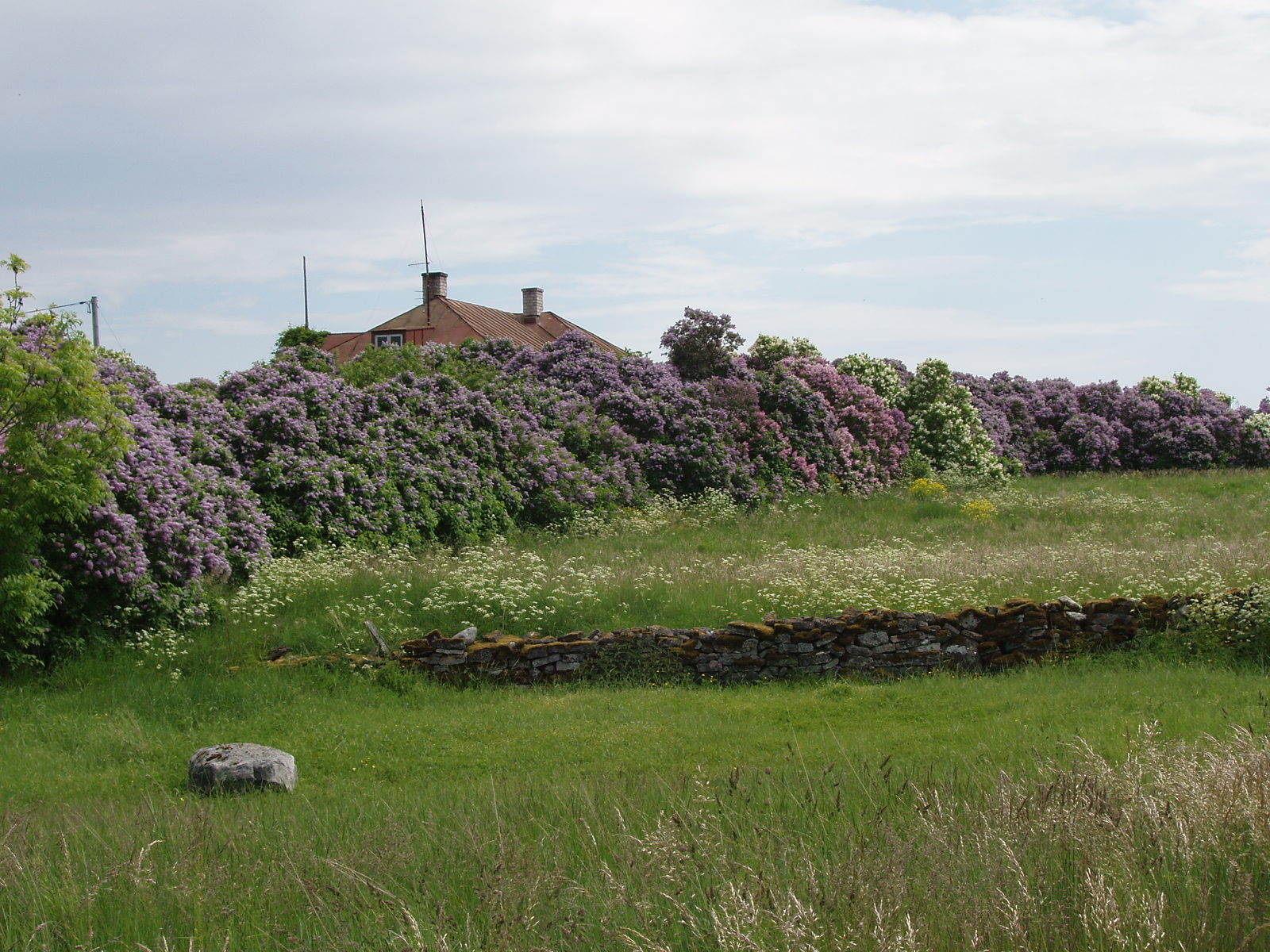 Sirelihekk Vilsandil